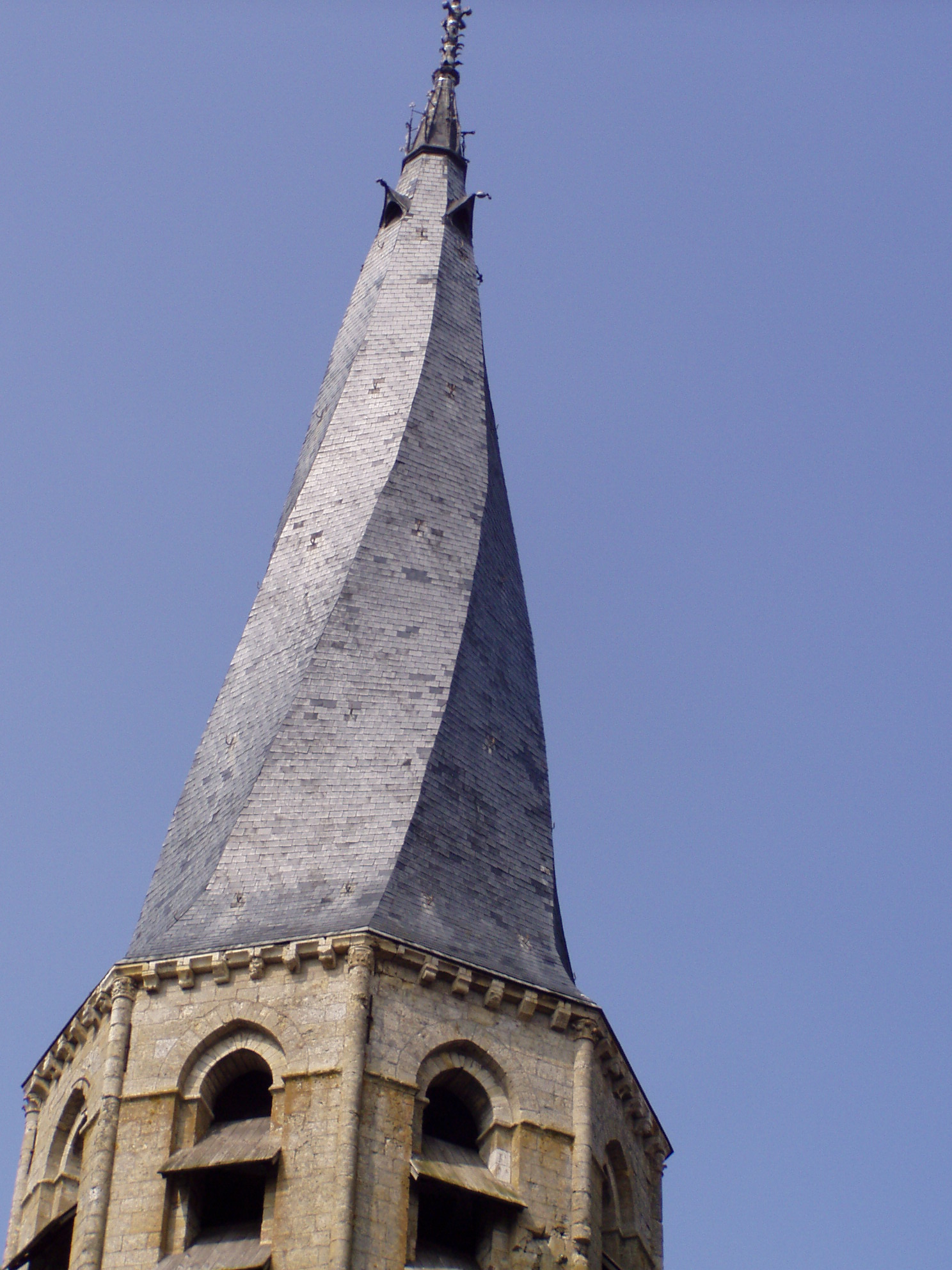 Photographie du clocher de l'église Notre-Dame à Puiseaux (Loiret) prise le 28 avril 2006 par Accrochoc